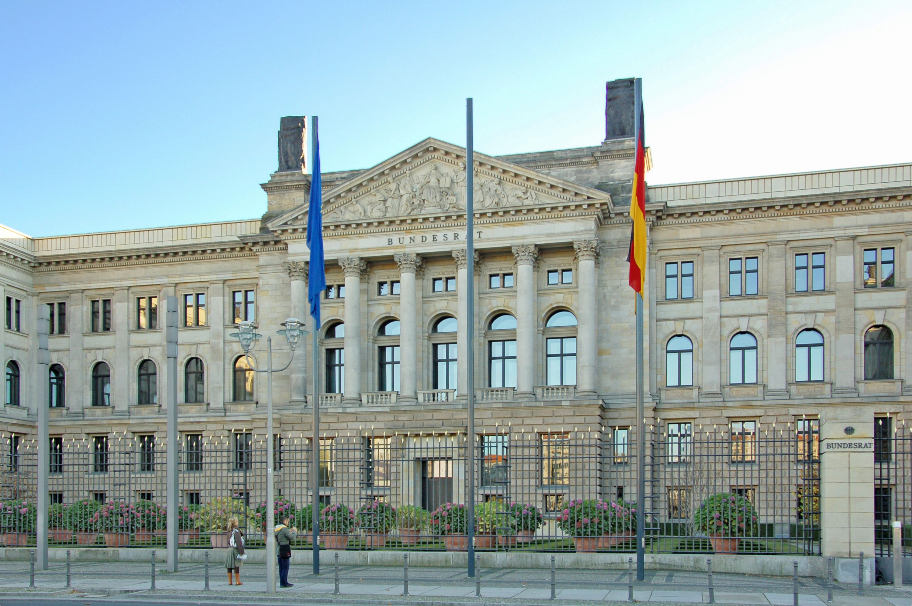 Bundesrat Deutschland Hornjoserbsce: Pruski knježi dom w Berlinje, sydło Zwjazkoweje rady.